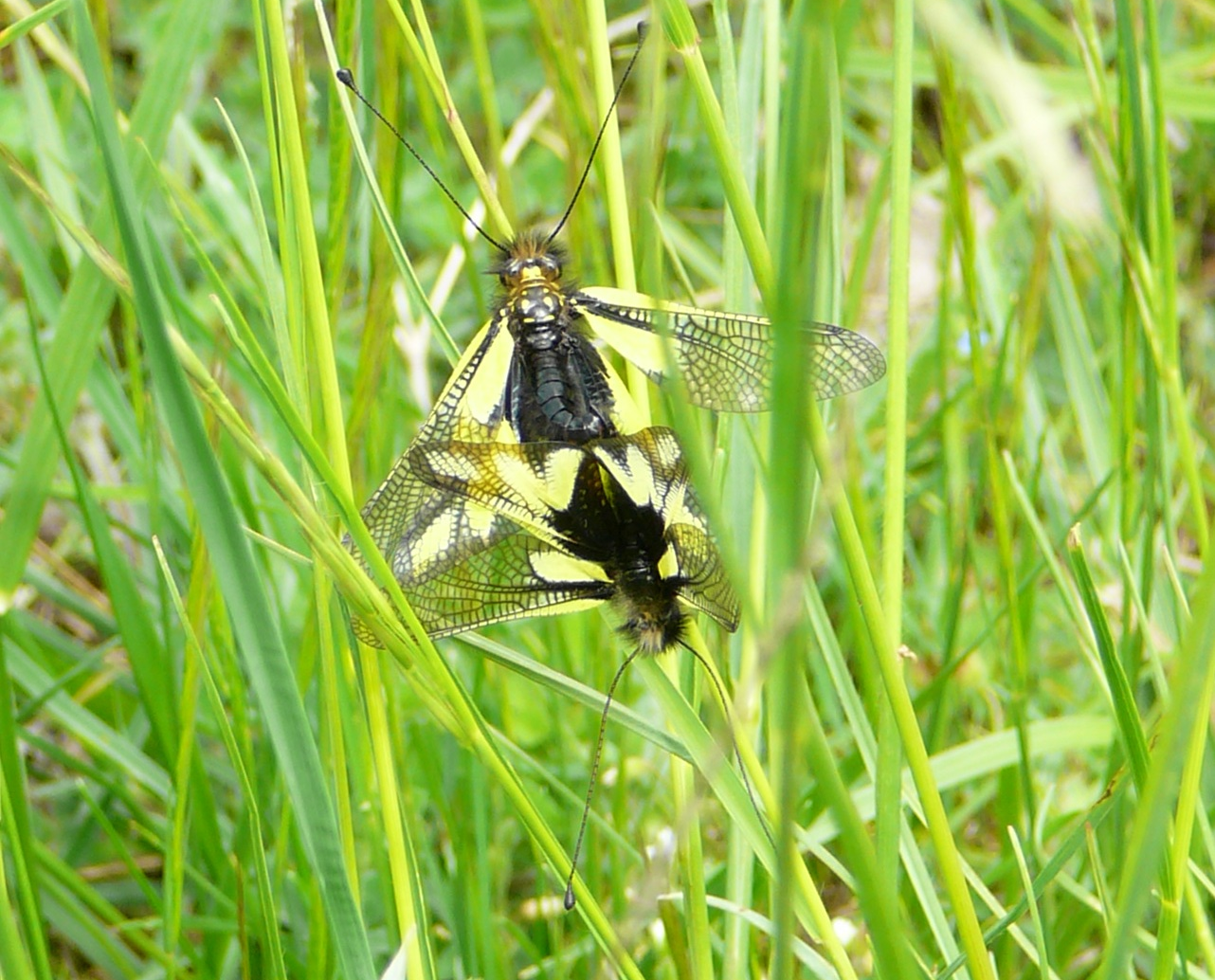 Cutted version of Libelloides-coccajus couple.JPG